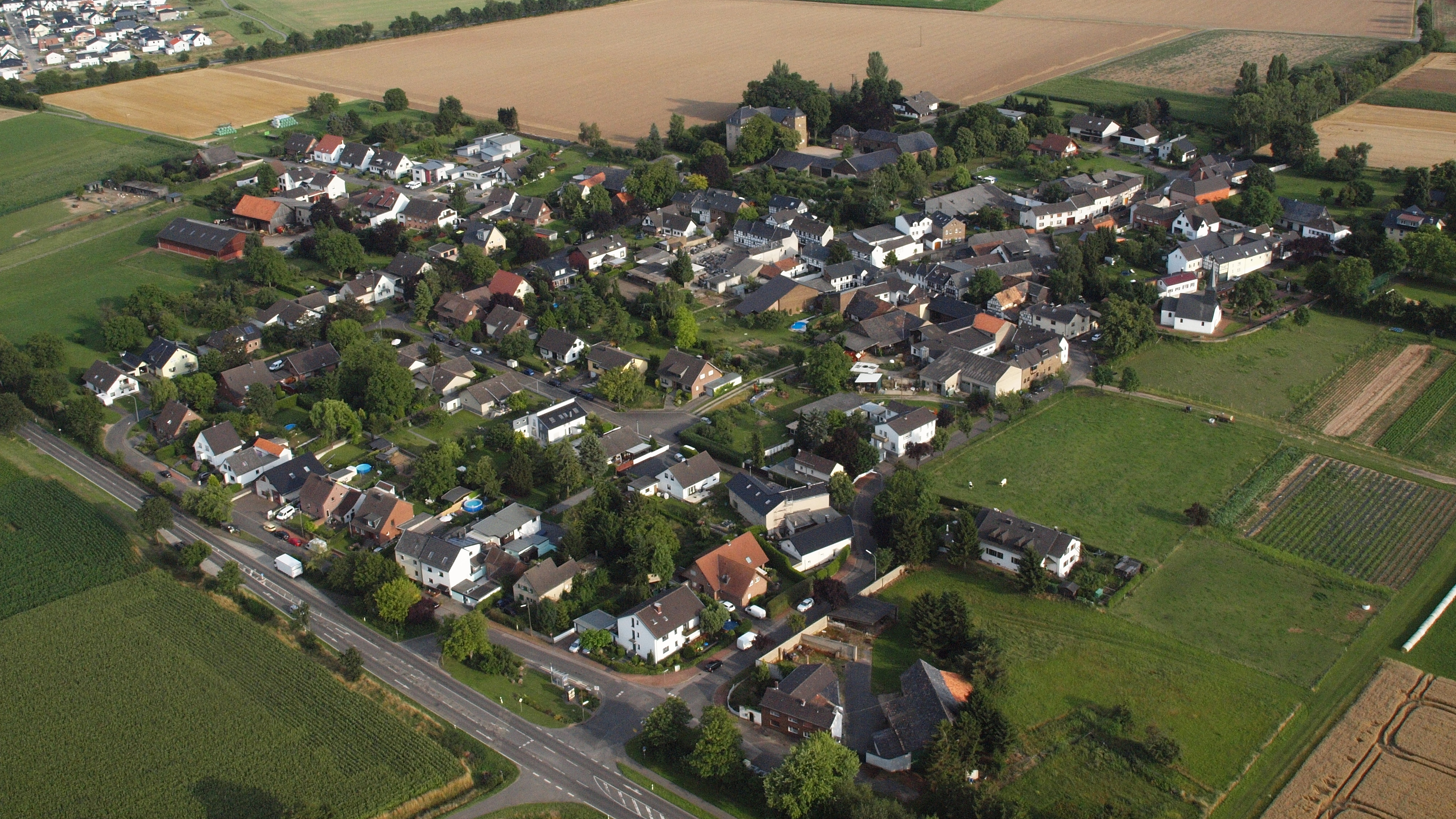 Niederkastenholz, Luftaufnahme (2015)